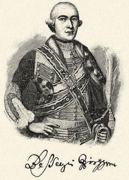 Bessenyei György (1747–1811) író, költő. Morelli Gusztáv fametszete. Megjelent Az Osztrák-Magyar Monarchia írásban és képben (1887–1901) kiadványban